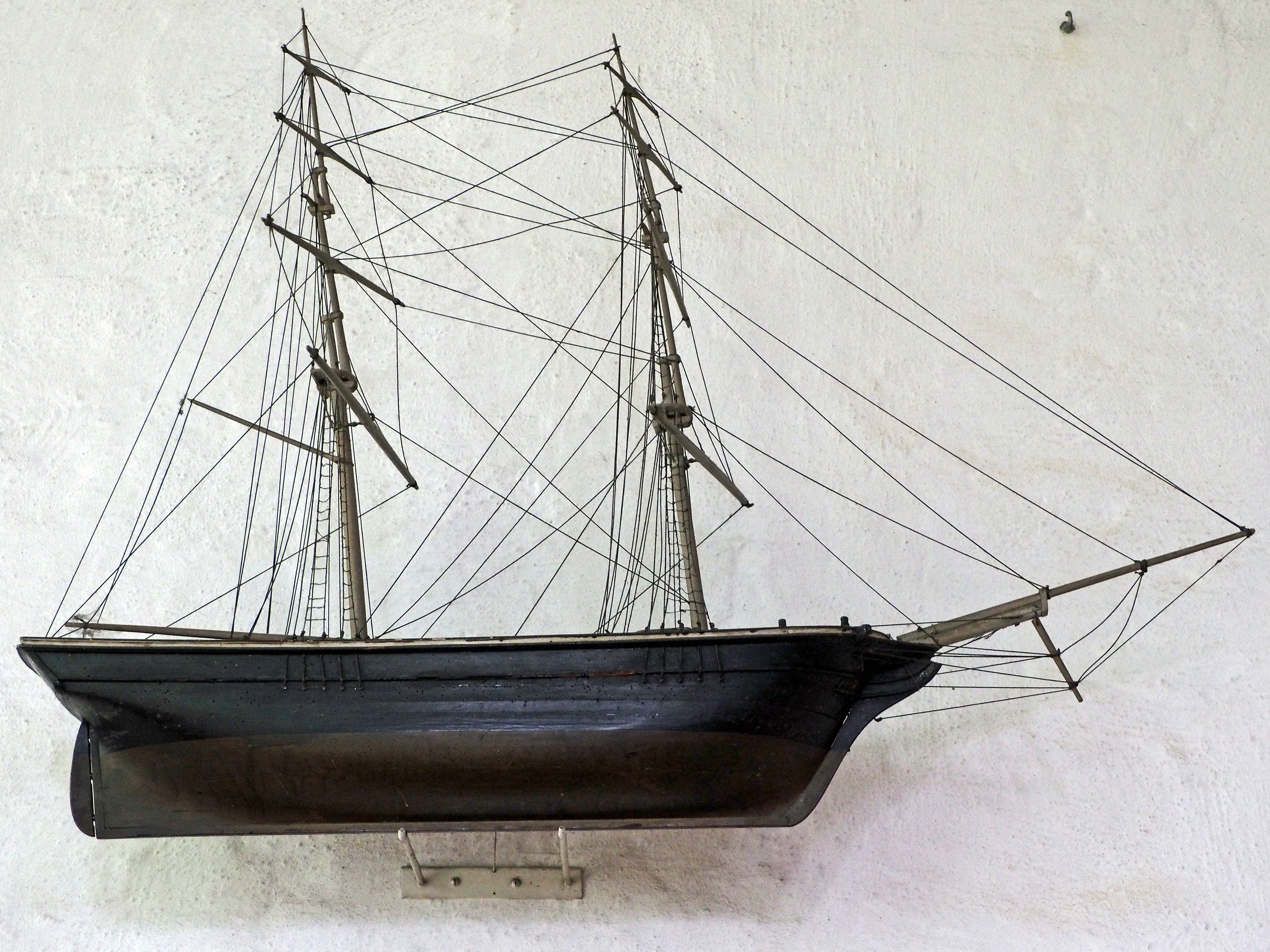 Modell des Missionsschiffes Kandaze in der St. Peter- Paul-Kirche, Hermannsburg